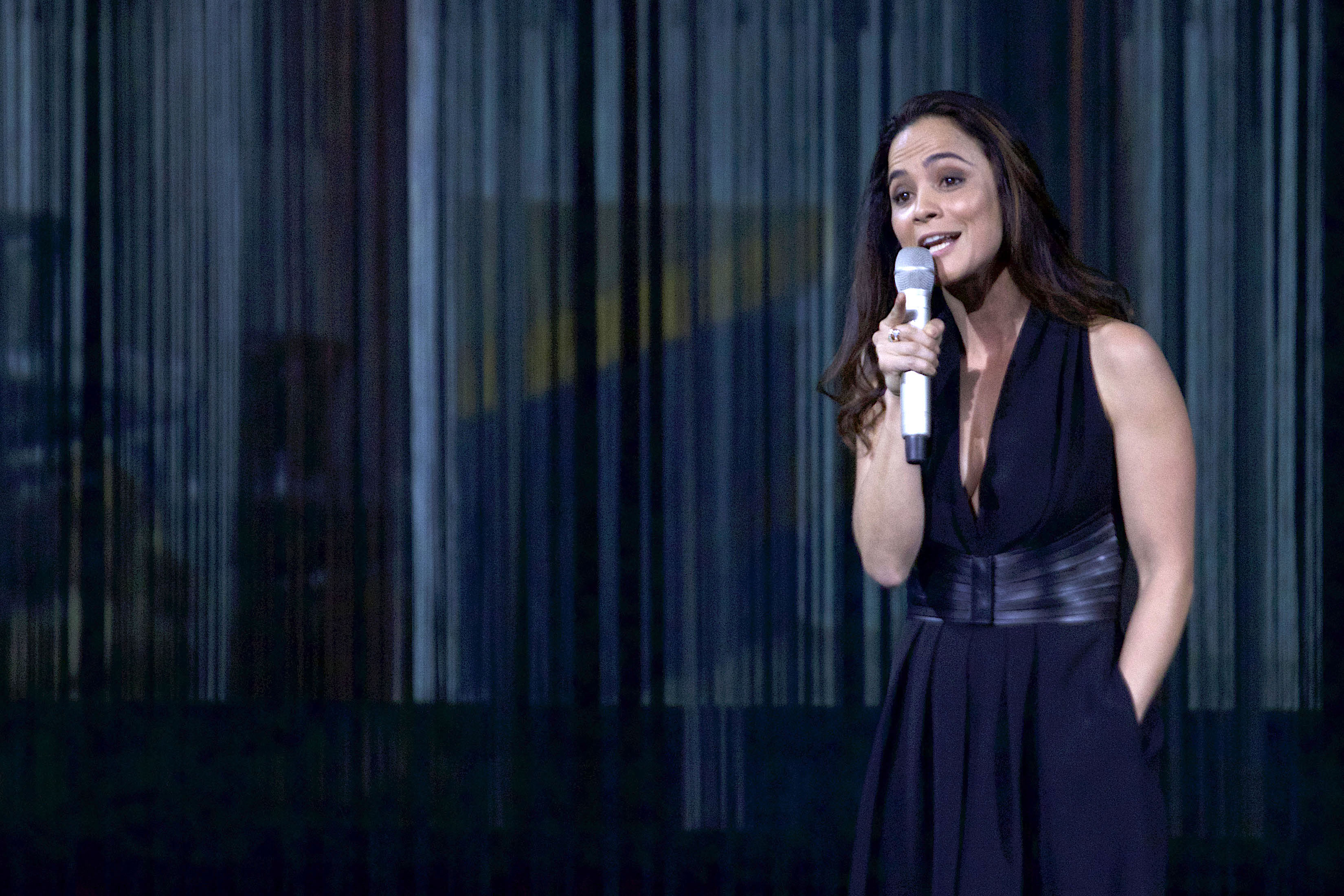 Miércoles 7 de noviembre de 2018En el Teatro de la Ciudad Esperanza Iris, se realizó la entrega de Premios Fénix a lo más destacado de la cinematografía Iberoamericana, en la ceremonia actores, directores y personalidades del mundo cinematográfico, presentadores hicieron entrega de los premios. Asimismo se realizaron espectáculos musicales.Fotografía: Milton Martínez / secretaría de Cultura CDMX